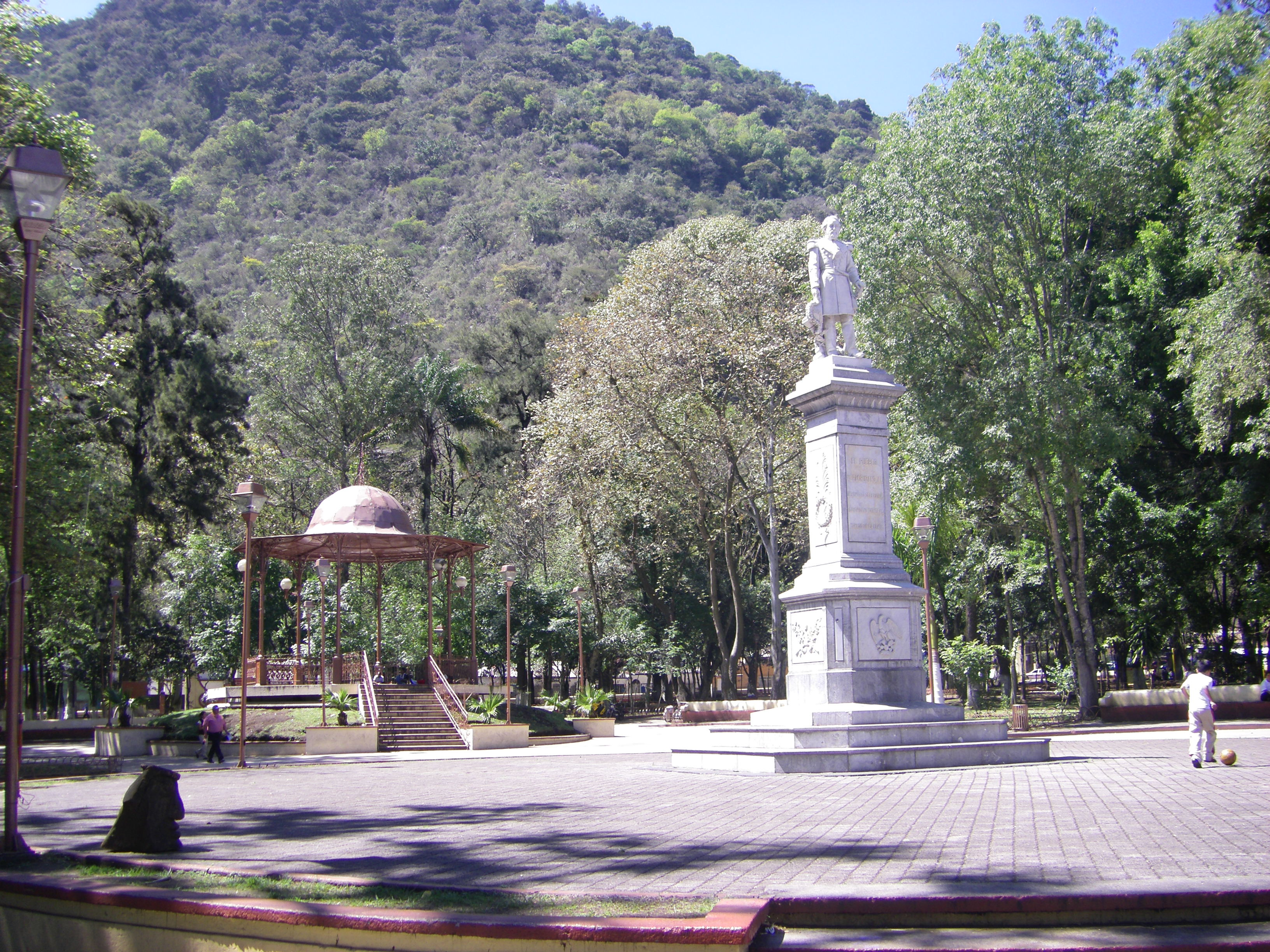 Park in Orizaba, Veracruz - Mexiko